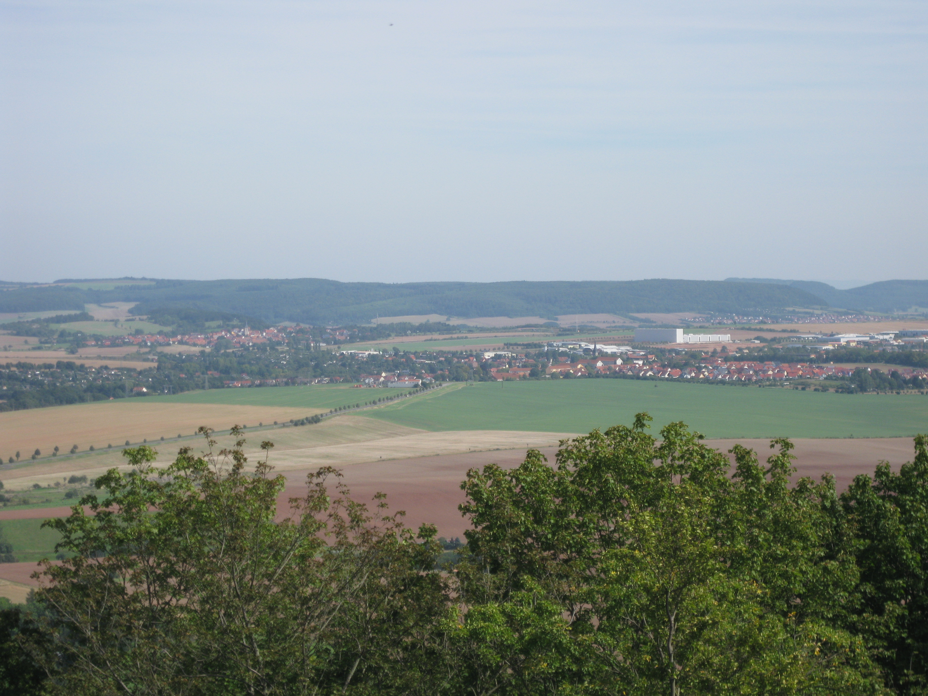 Aussicht von Burg Scharfenstein auf Leinefelde und Breitenbach (im Hintergrund das Ohmgebirge)